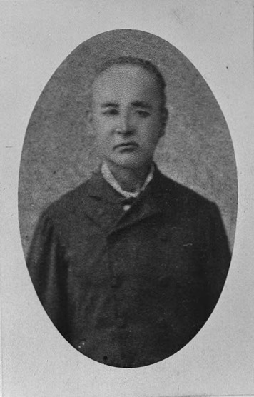 陸奥岩出山領10代領主・伊達邦直の肖像写真。